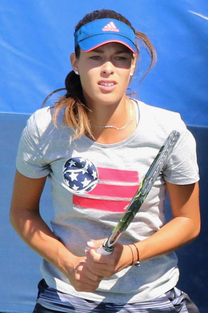 Ivanovic US16 (20)